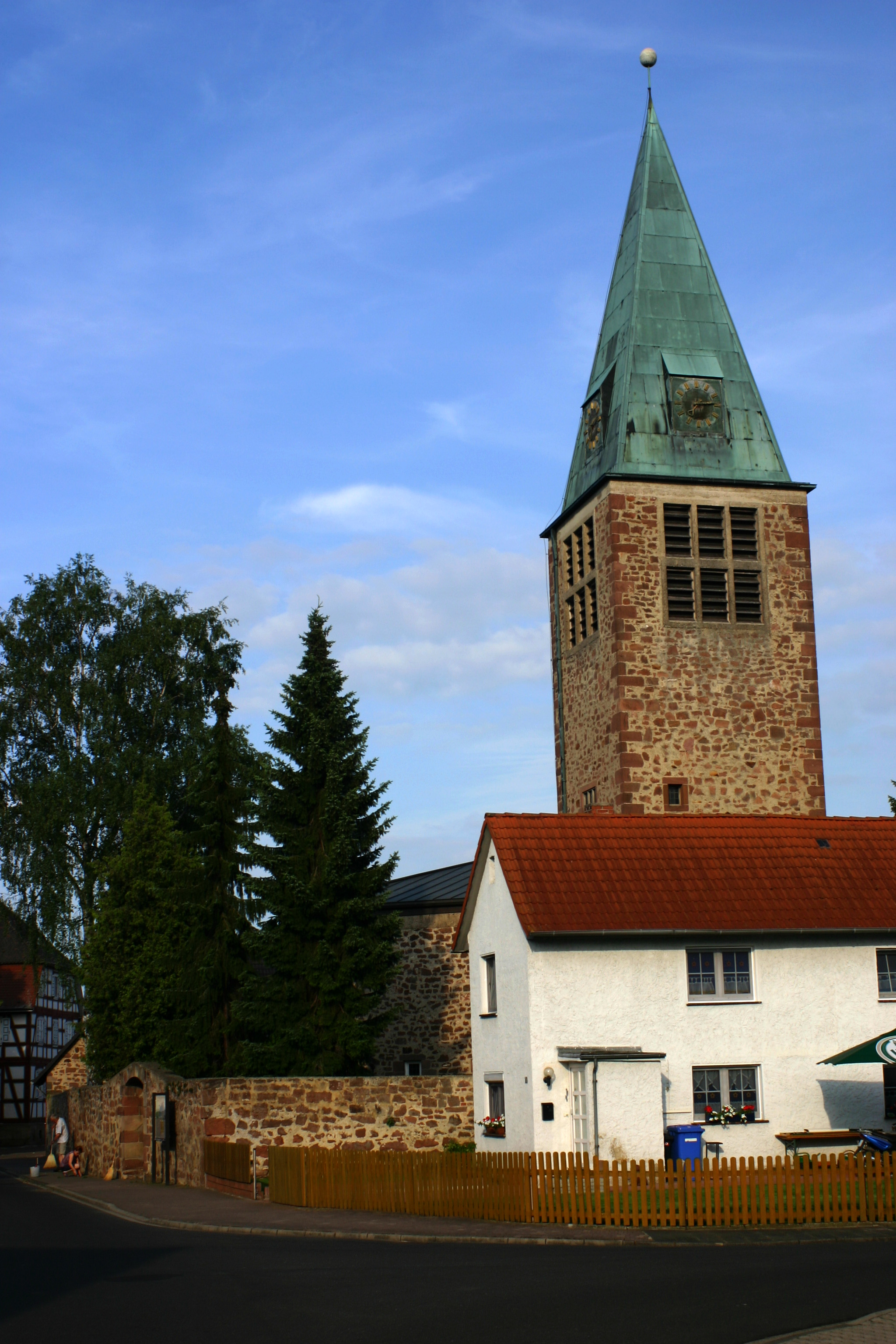 Borken (Hessen) - Kirche im Stadtteil Gombeth